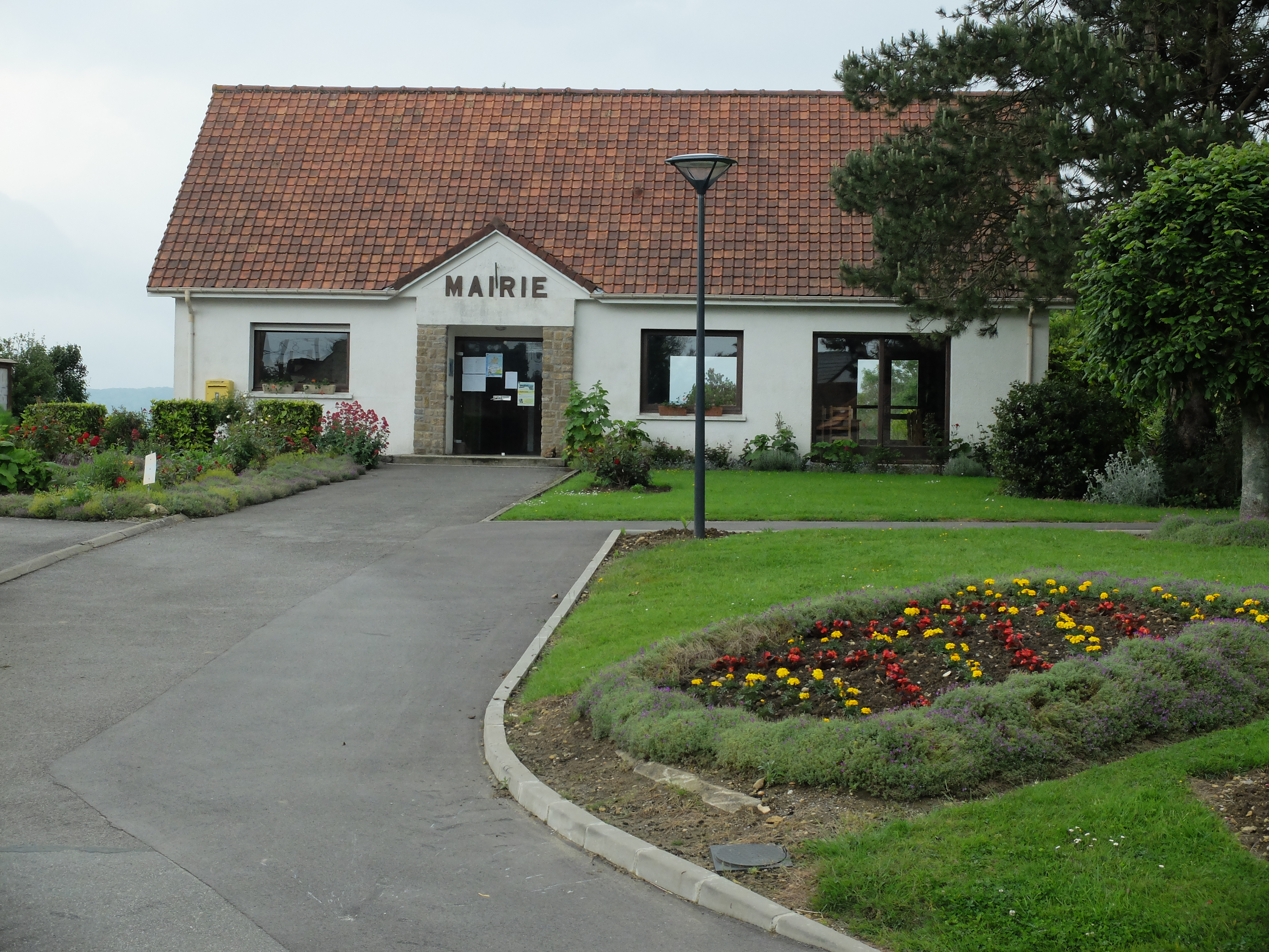 Vue de la mairie d'Alincthun.